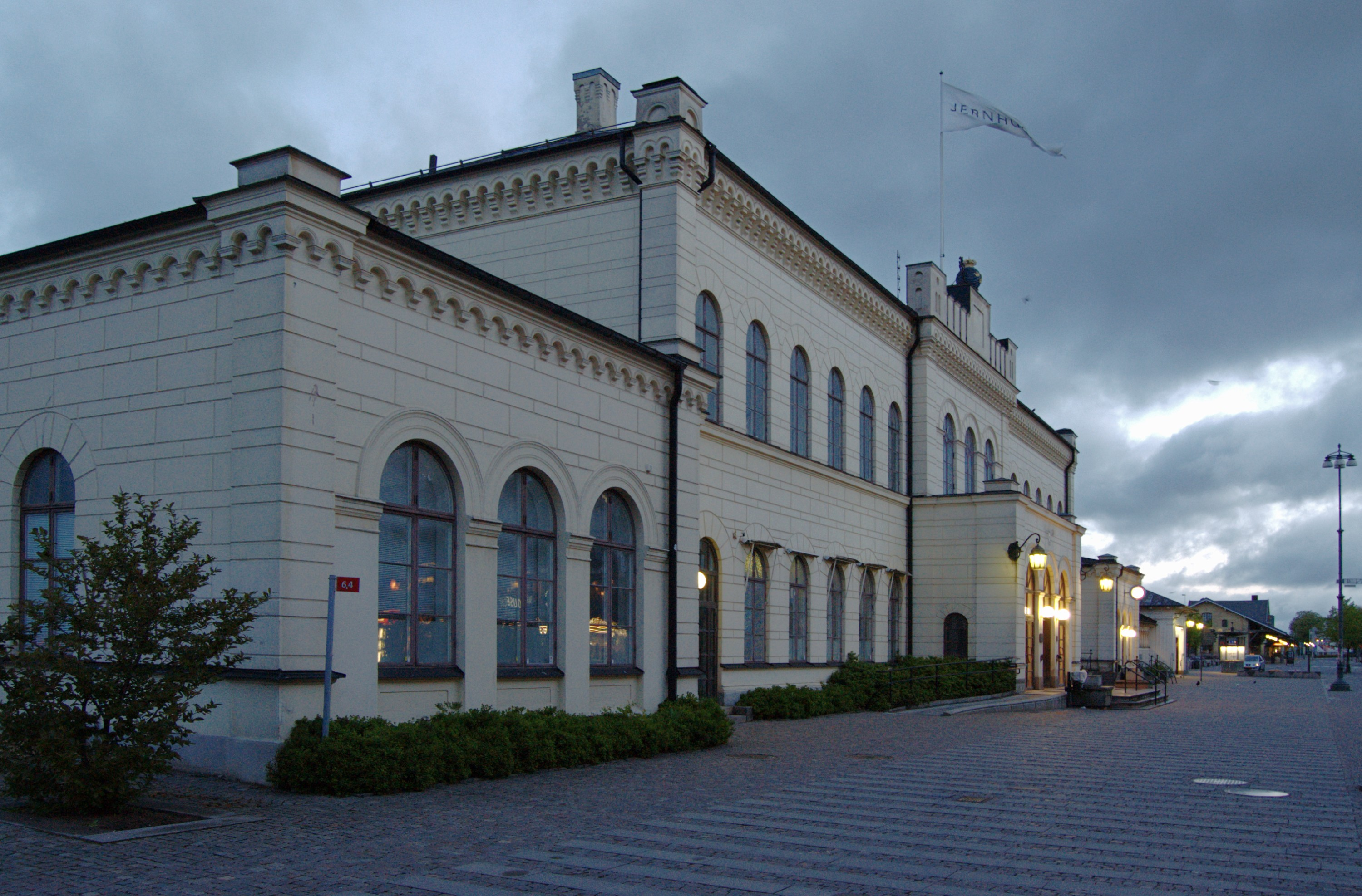 Lunds centralstation (Skåne - Sverige)